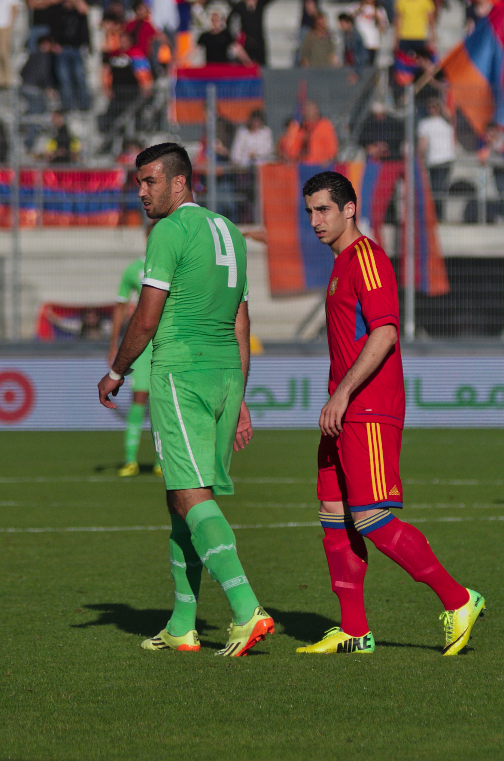 Algérie - Arménie - 20140531